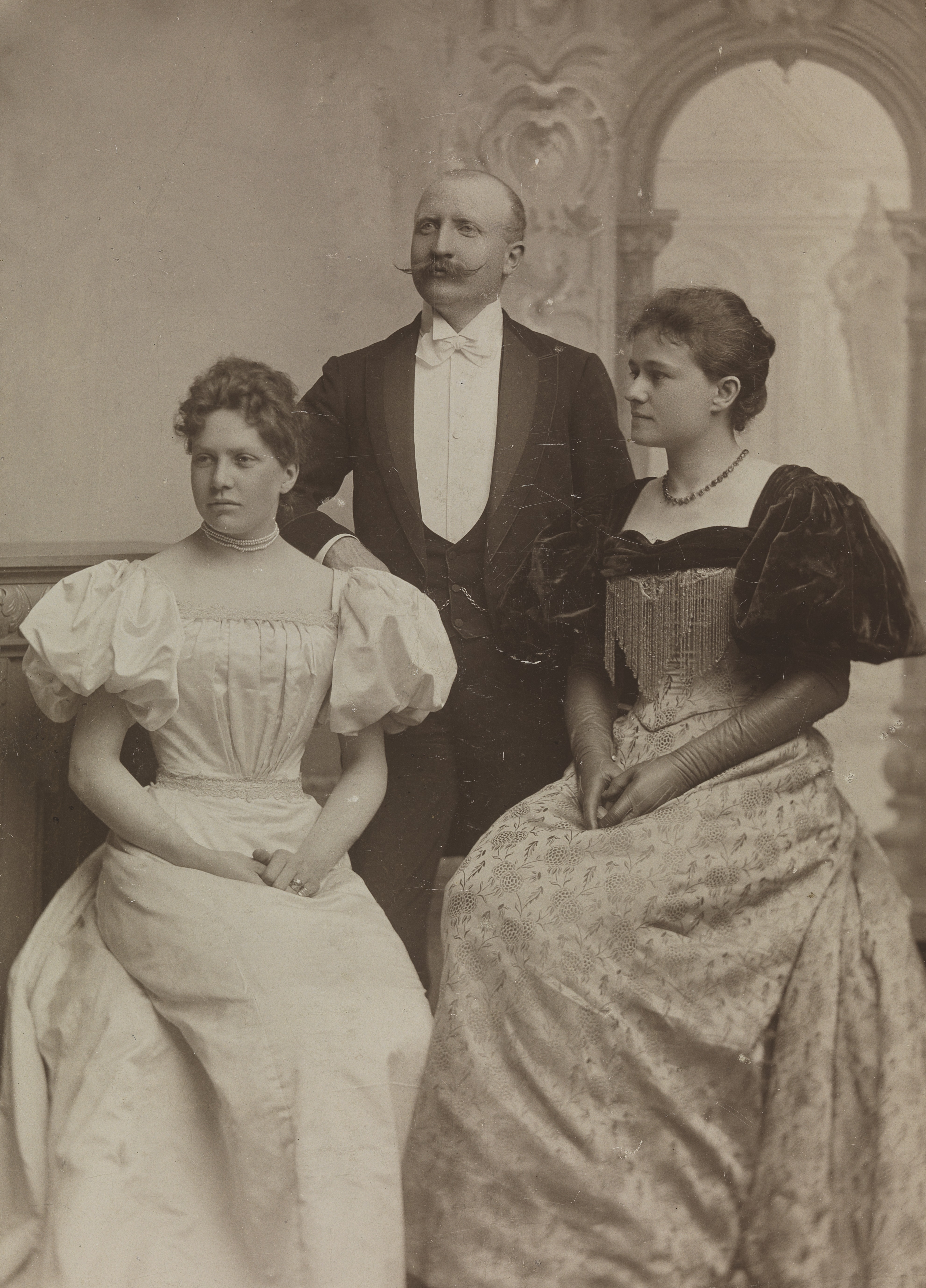 Fra venstre Mally Lammers, Thorvald Lammers og Eva Nansen. Depicted person: Lammers, Mally (1850-1929); født Sars Depicted person: Lammers, Thorvald (1841-1922) Depicted person: Nansen, Eva (1858-1907); født Sars Depicted place: Oslo